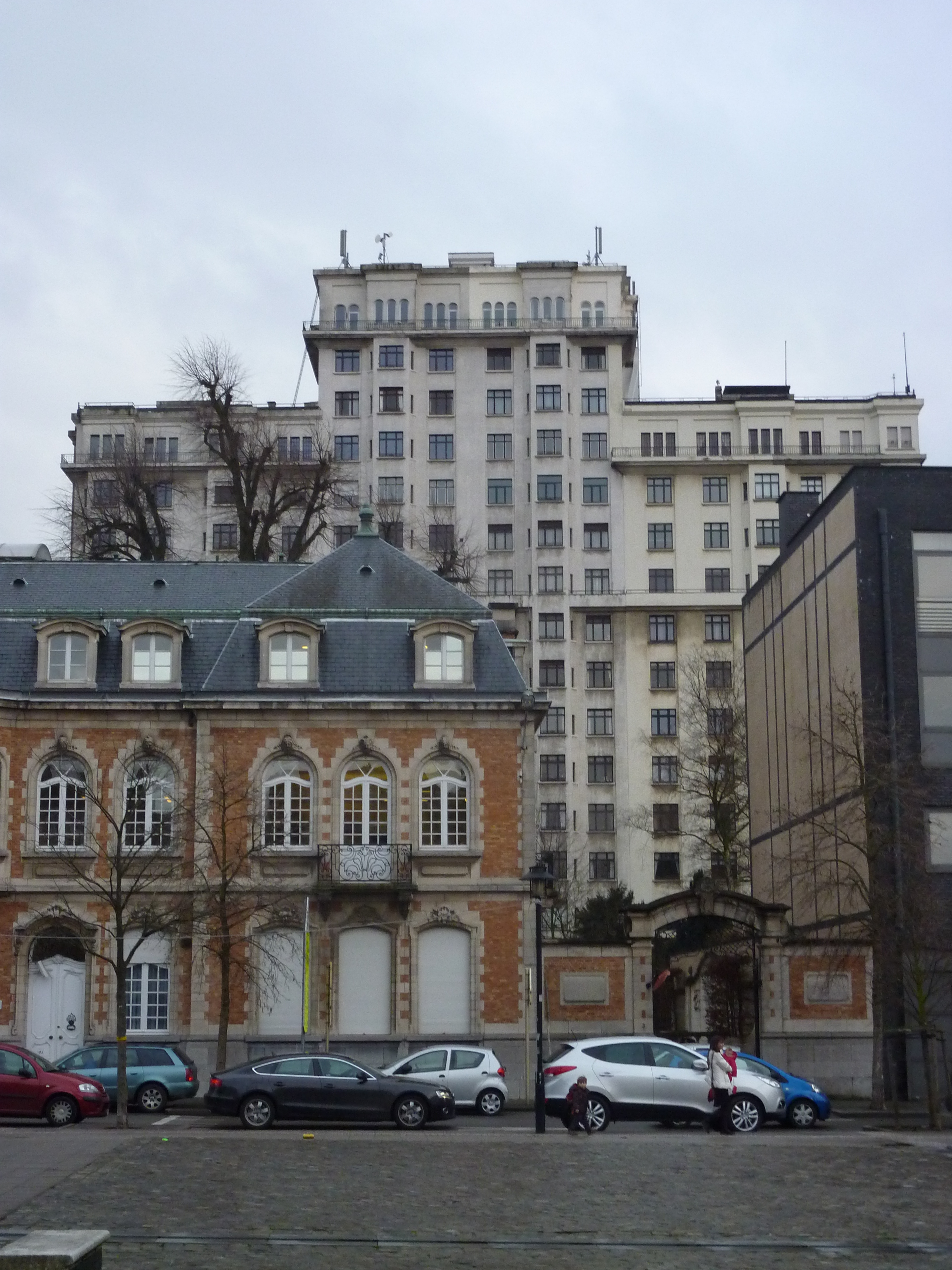 Les Pavillons français à Schaerbeek, Bruxelles, Belgique.